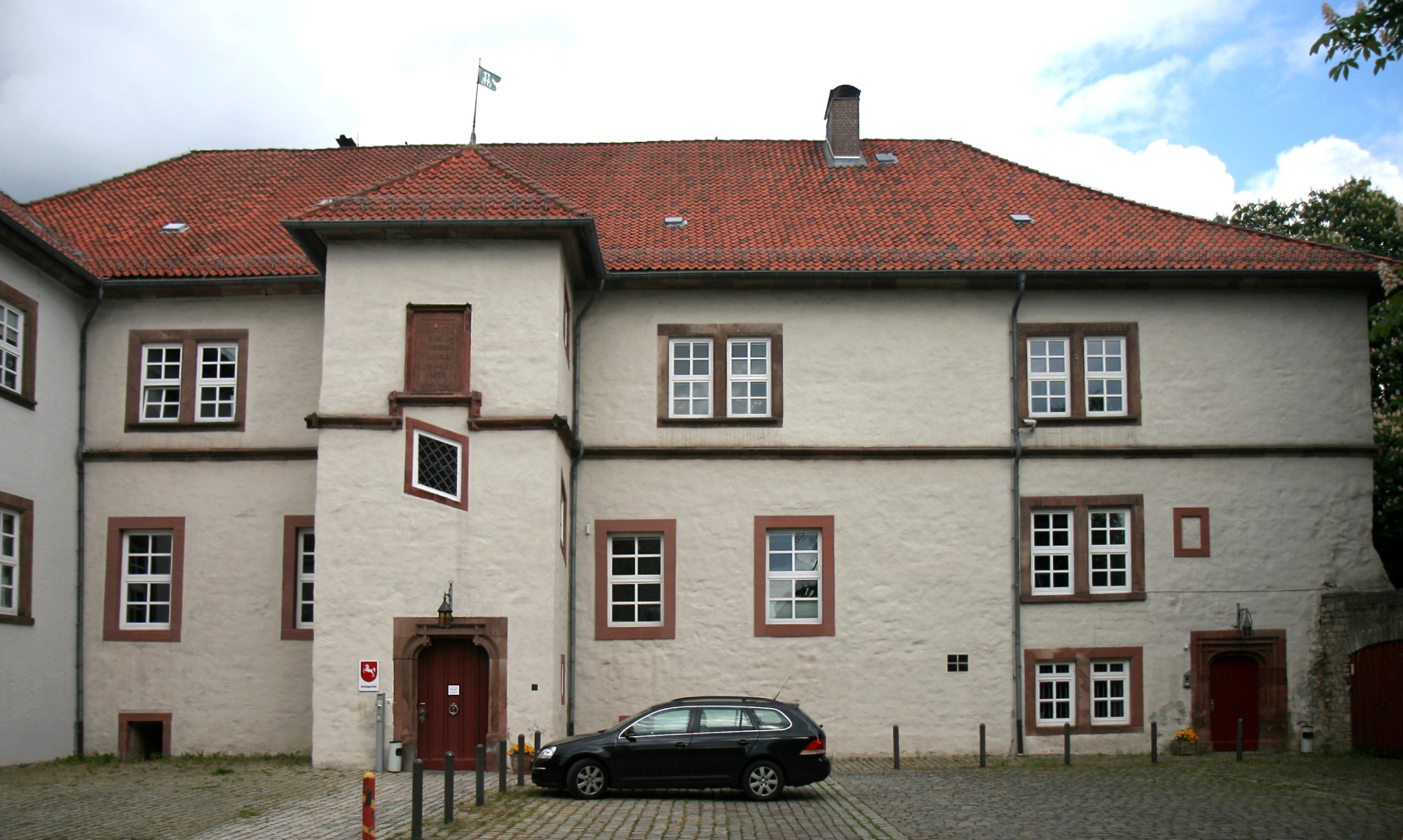 Gebäude des Amtsgerichts Bad Gandersheim, Herrenhaus der Burg, Am Plan 3 b in Bad Gandersheim.